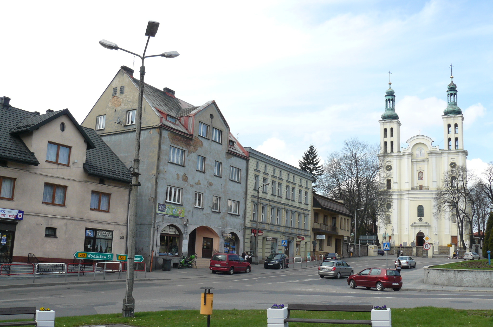 Pszów - centrum miasta.